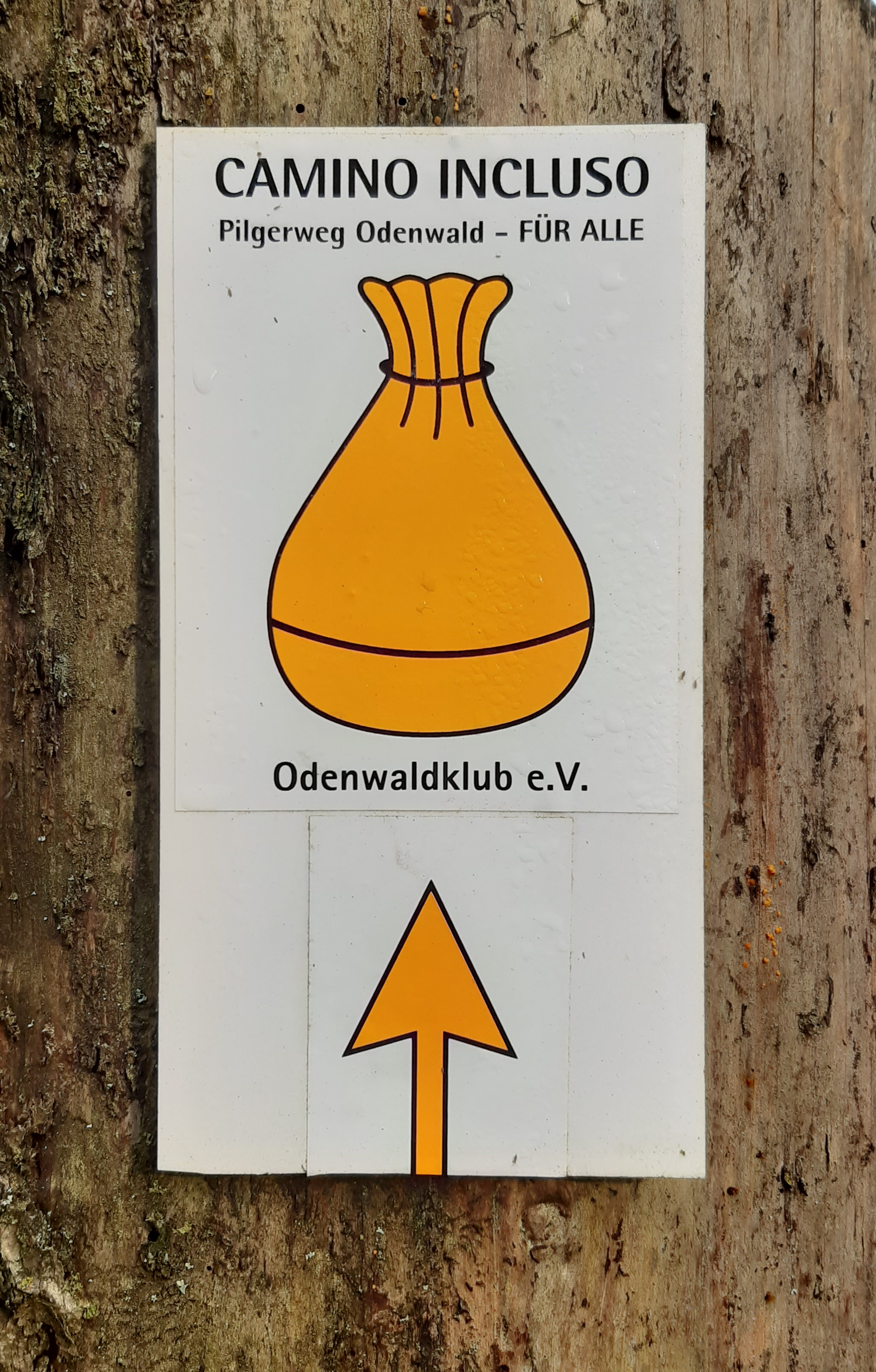 Camino Incluso - Wegzeichen Druck